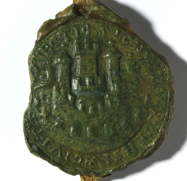 Oudst bekende zegel van de stad Utrecht. Zegel dateert uit omstreeks 1227 maar het was vermoedelijk rond 1196 al in gebruik. Het zegel wordt gezien als een symbolische weergave van de middeleeuwse stad Utrecht met de stadsmuur, burchtmuur, kerken en het bisschoppelijk paleis met de bisschopstoren. Het randschrift op het zegel luidt in het Latijn: "Signum burgensium civitatis Traiecti" (vertaald: Zegel van de burgers van de stad Utrecht).